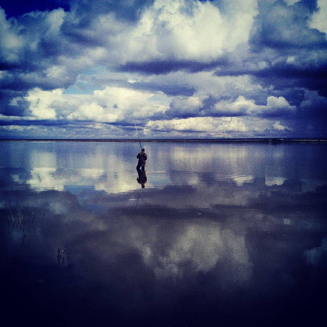 Чограйский заказник: Расположен в 28 км на север от села Арзгир,Арзгирский район, Ставропольский край This image is related to the protected area of Russia number 2610026